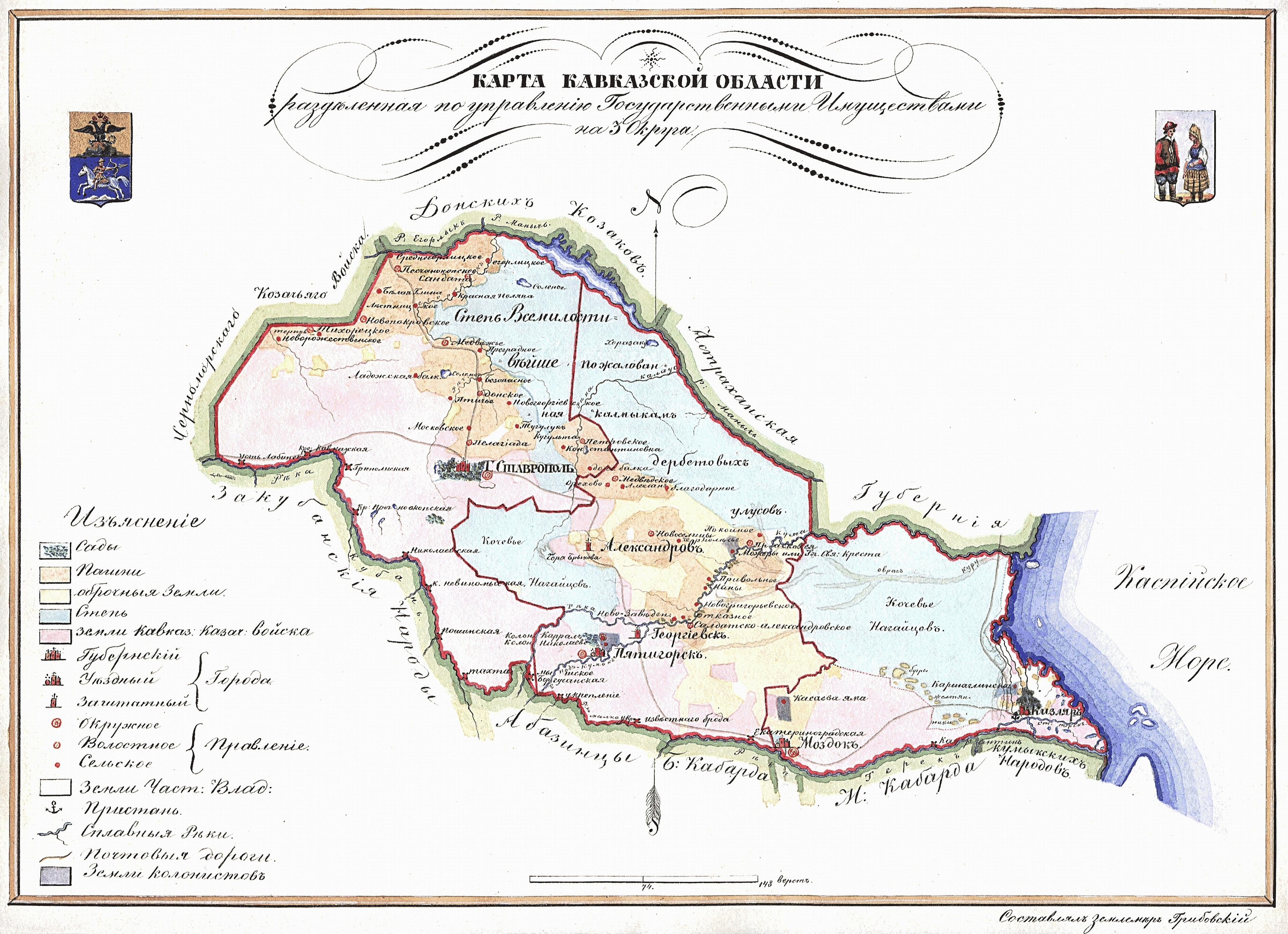 Карта кавказской области